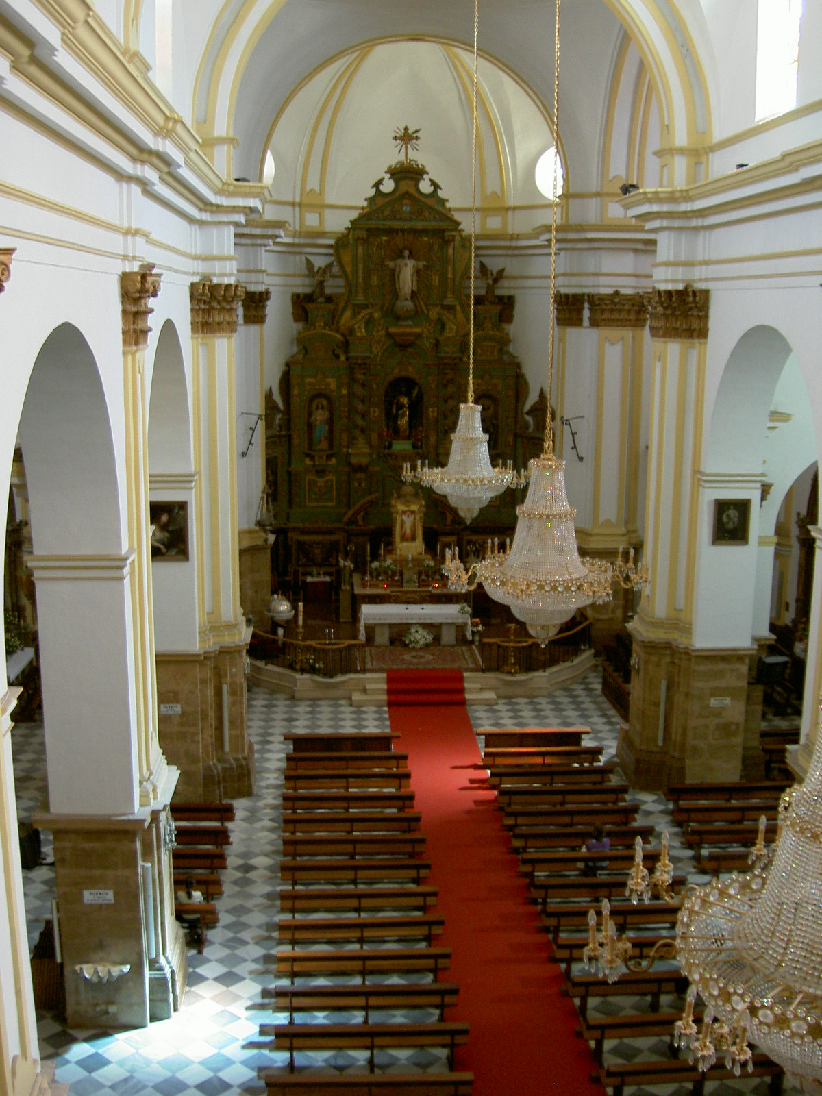 Nave Principal de la Iglesia de la Encarnación, desde el coro. Marbella, Málaga, Andalucía, España